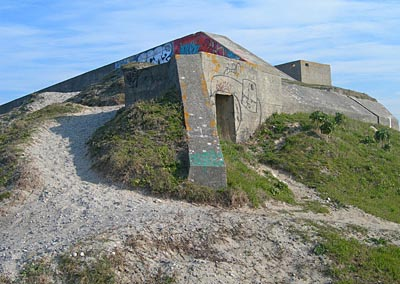 Tréguennec, le bunker ouest en extrémité de mur. Le pan coupé du mur comportait un escalier en bois permettant de monter jusqu'aux wagonnets.